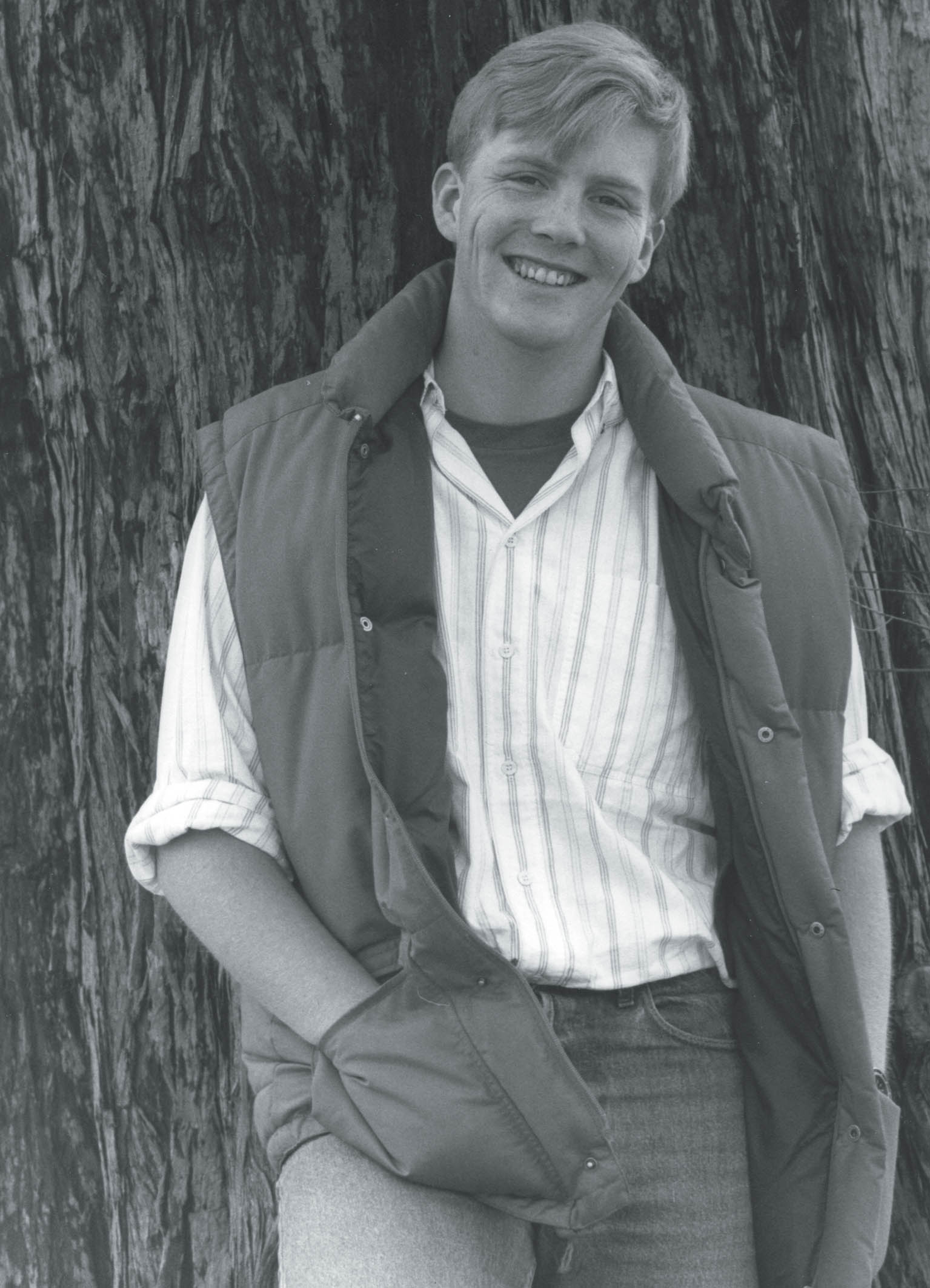 Jeugdportret van Prins Willem-Alexander, 1989.